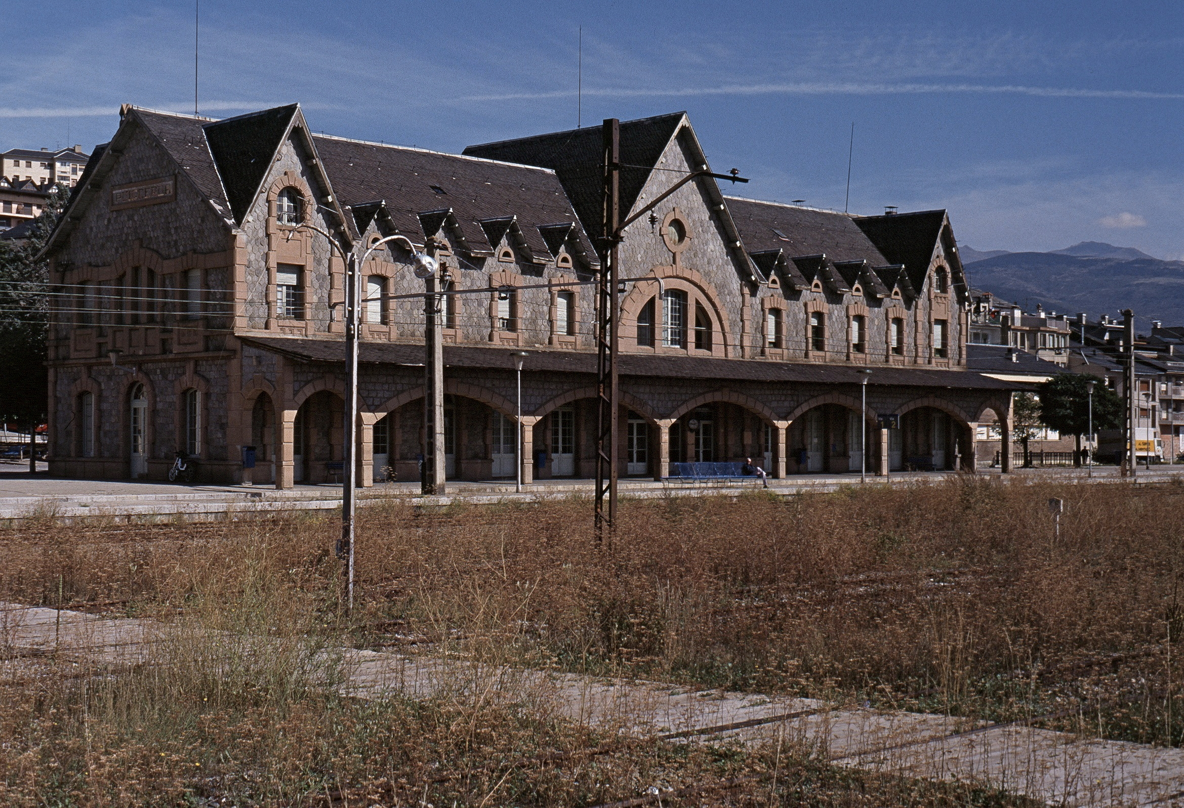 Estación de Puigcerdá (provincia de Girona).